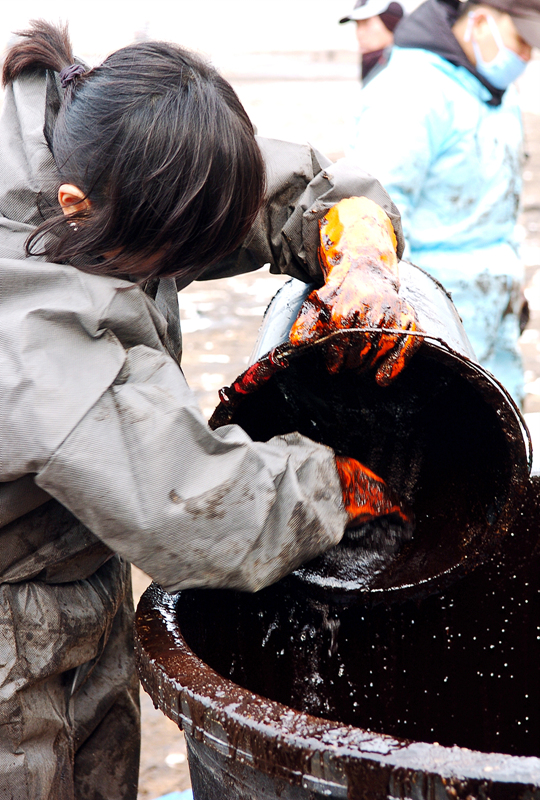 태안 원유 유출 사고 후 만리포 해수욕장. 수거한 기름을 비우고 있다.